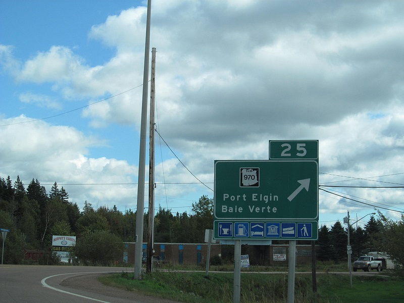 Panneau routier sur la Route 16 au Nouveau-Brunwick indiquant la direction de Baie-Verte et Port Elgin.